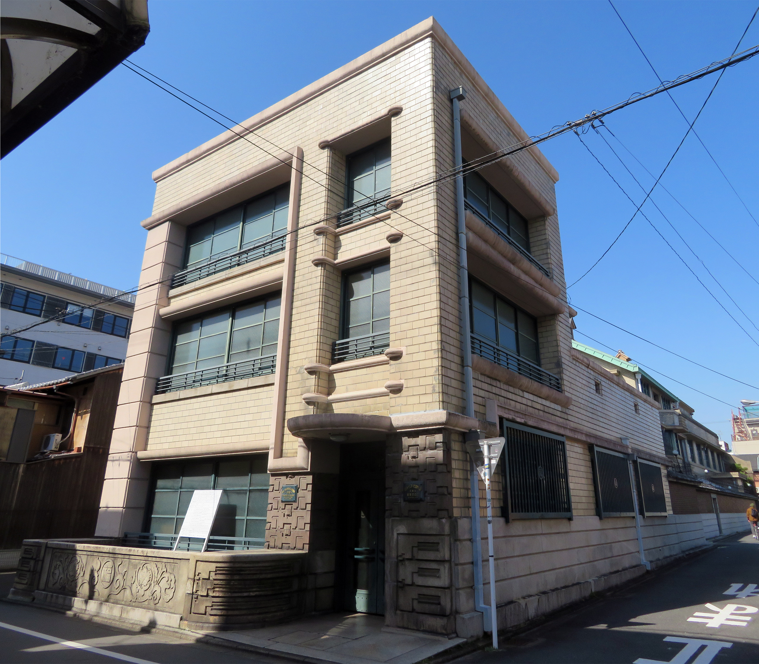 山内任天堂旧本社ビルを撮影。